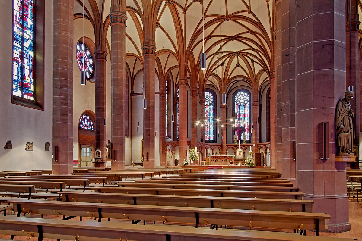 Innenraum der St. Bonifatiuskirche zur Osterzeit 2012